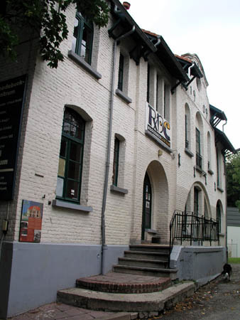 villa Montald à Woluwé st Lambert